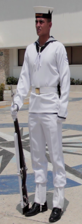 grumete